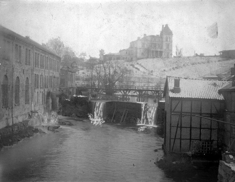 Bentse Bruk i 1896